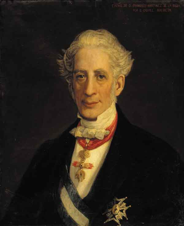 Retrato del poeta, dramaturgo, político y diplomático español Francisco Martínez de la Rosa (1787-1862).